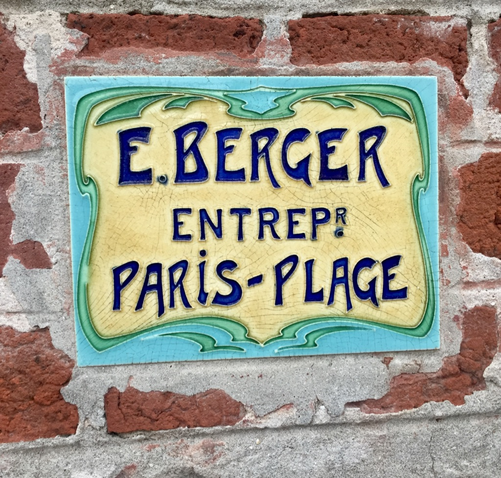 plaque apposée sur le bâtiment nouvellement construit.